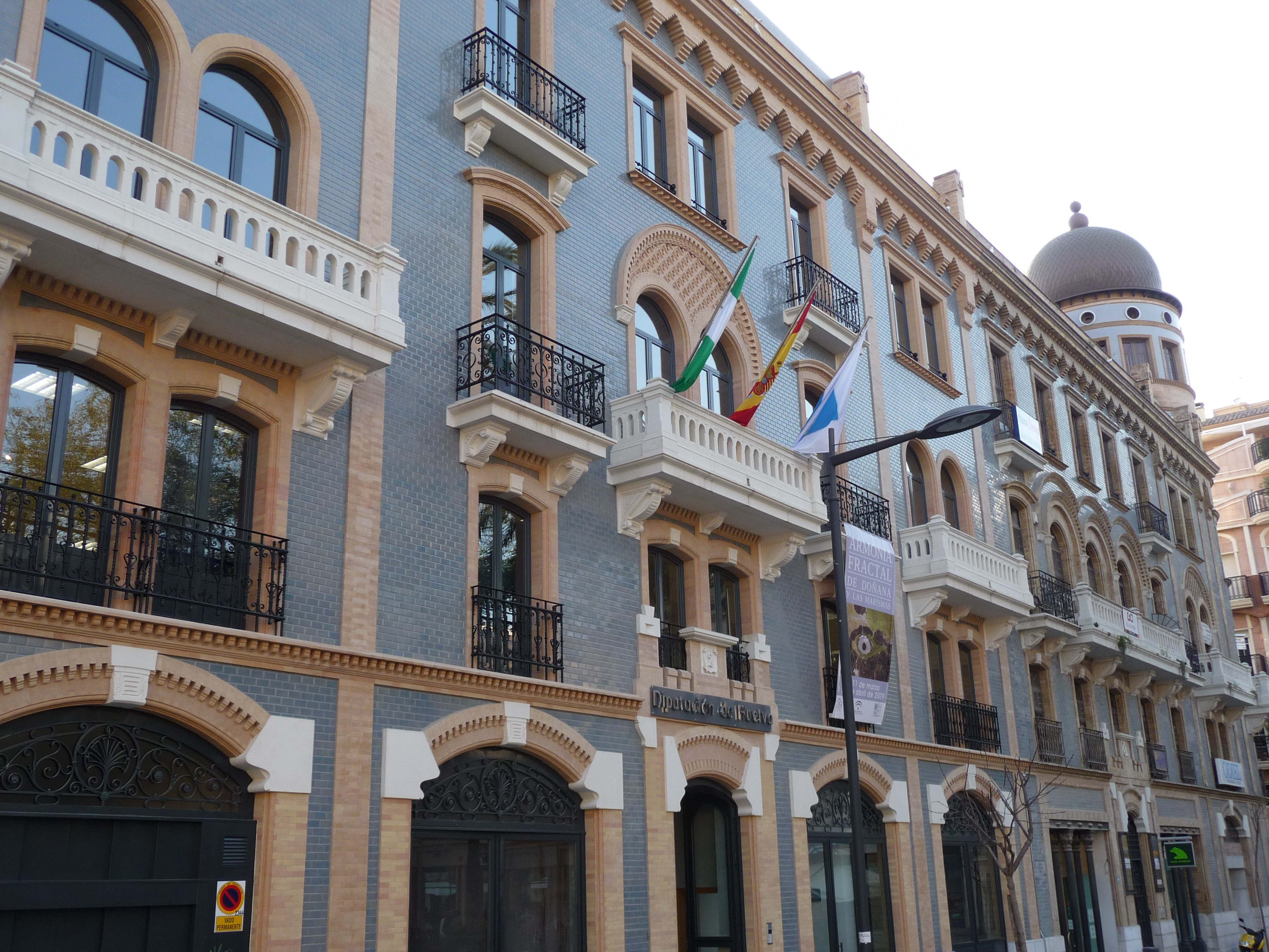 Edificio Hotel París (Huelva, España).